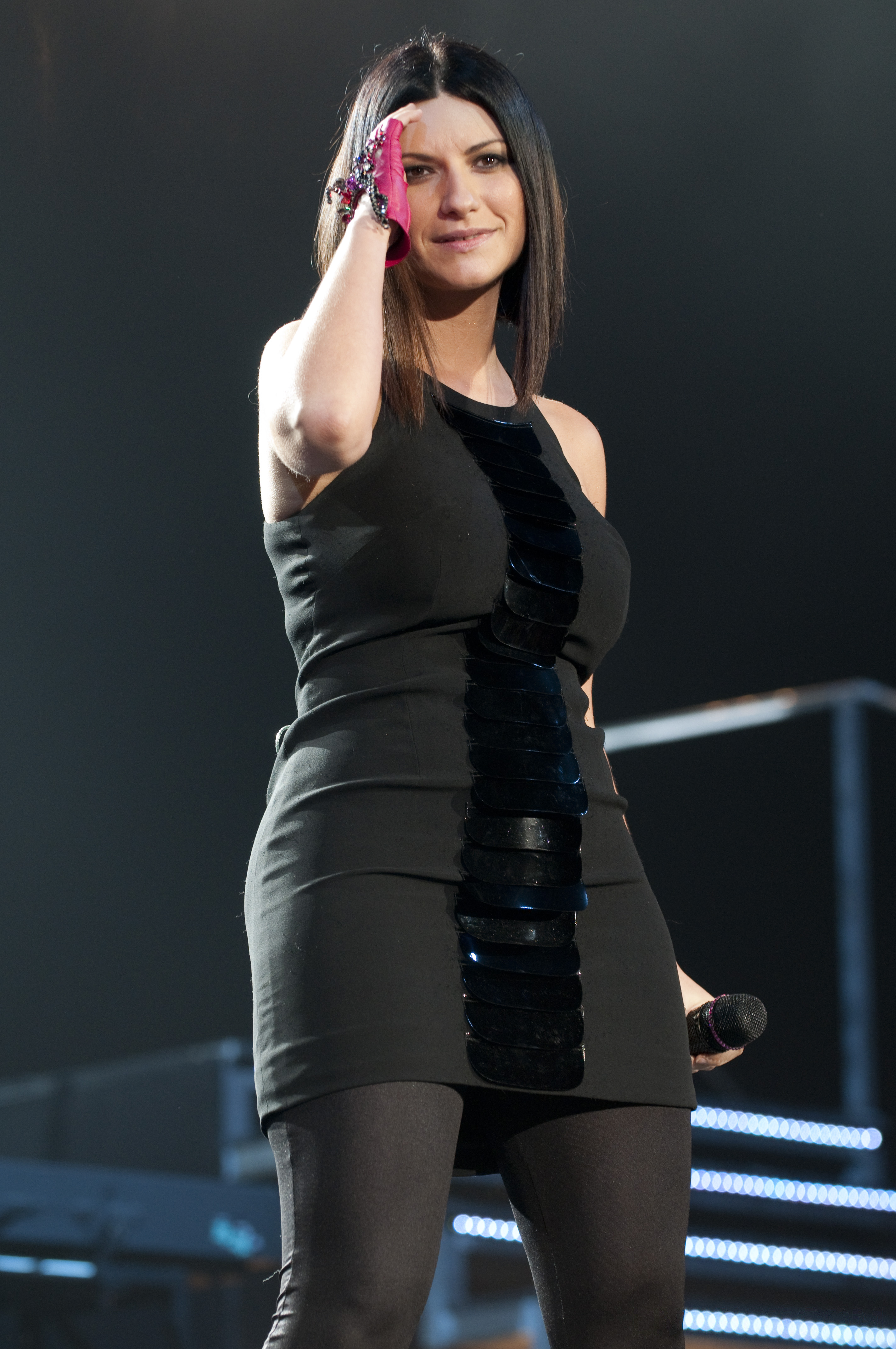 Laura Pausini